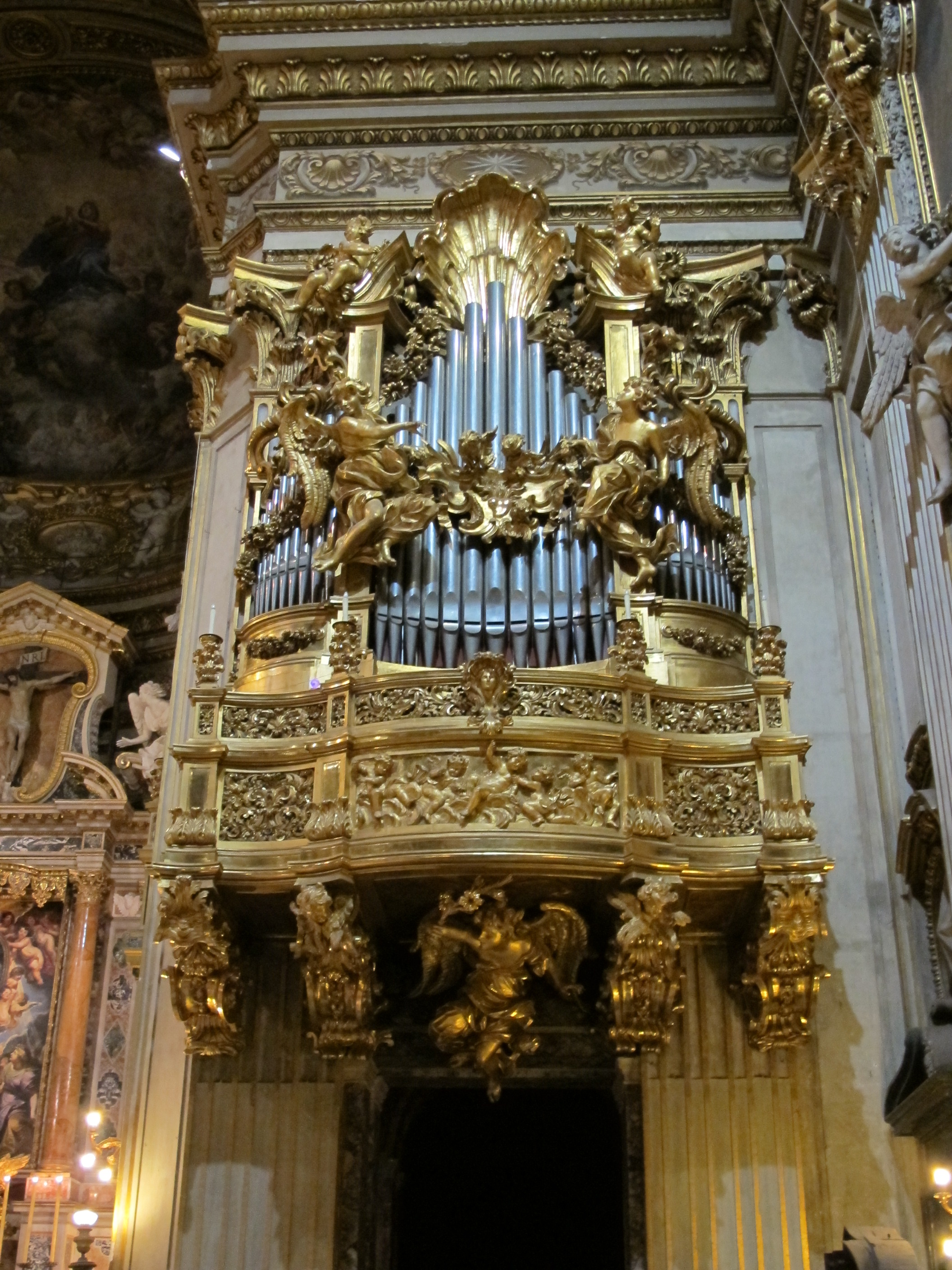 Santa maria in valicella, organo